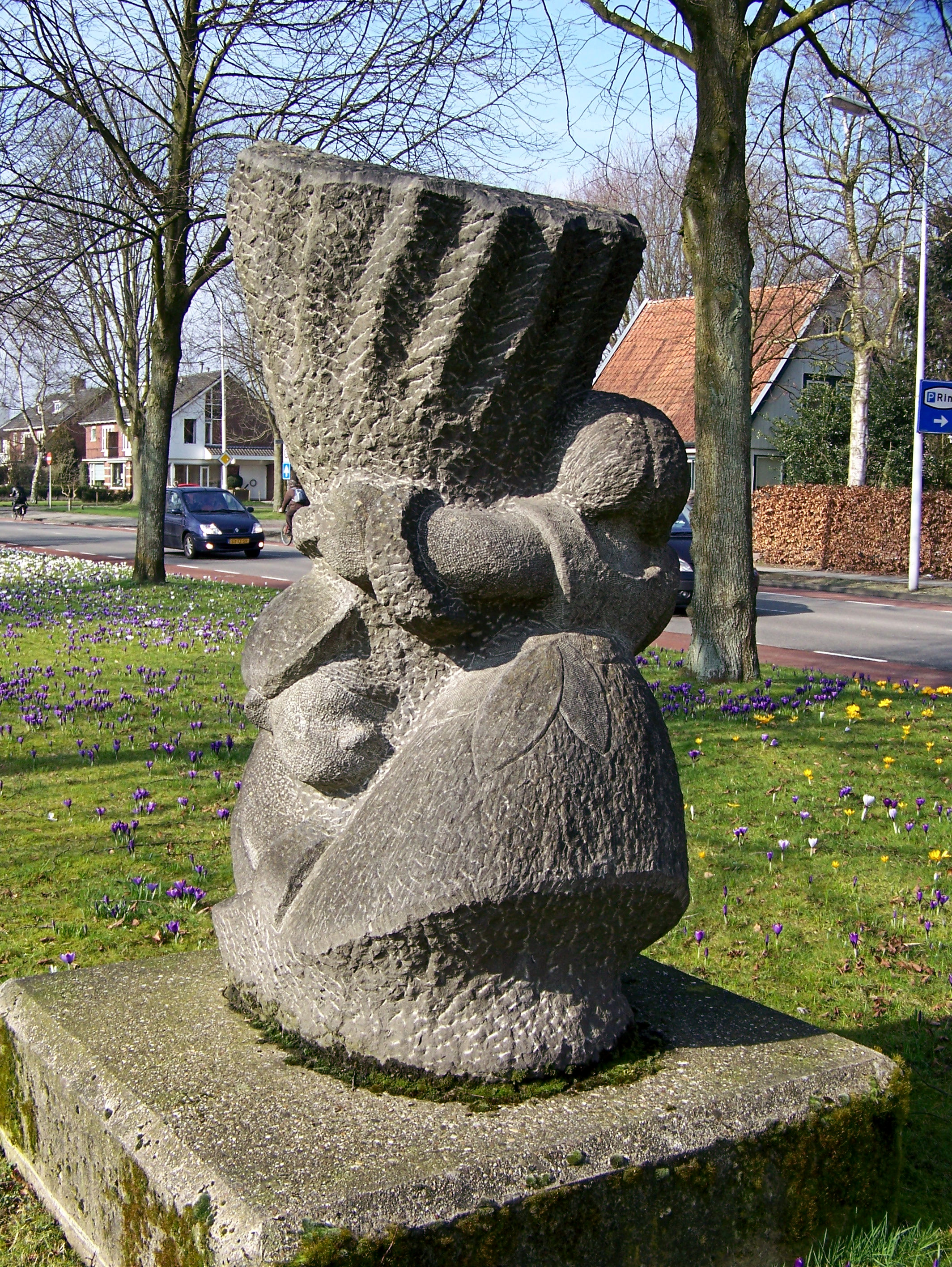 Anti-apartheidsbeeld (1986) van Anne Woudwijk, in Drachten.